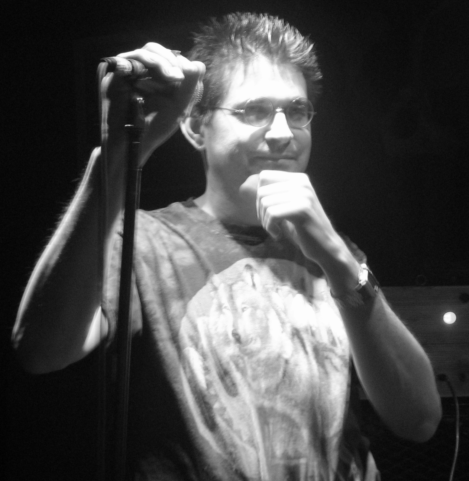 Steve Albini, en concert avec Shellac